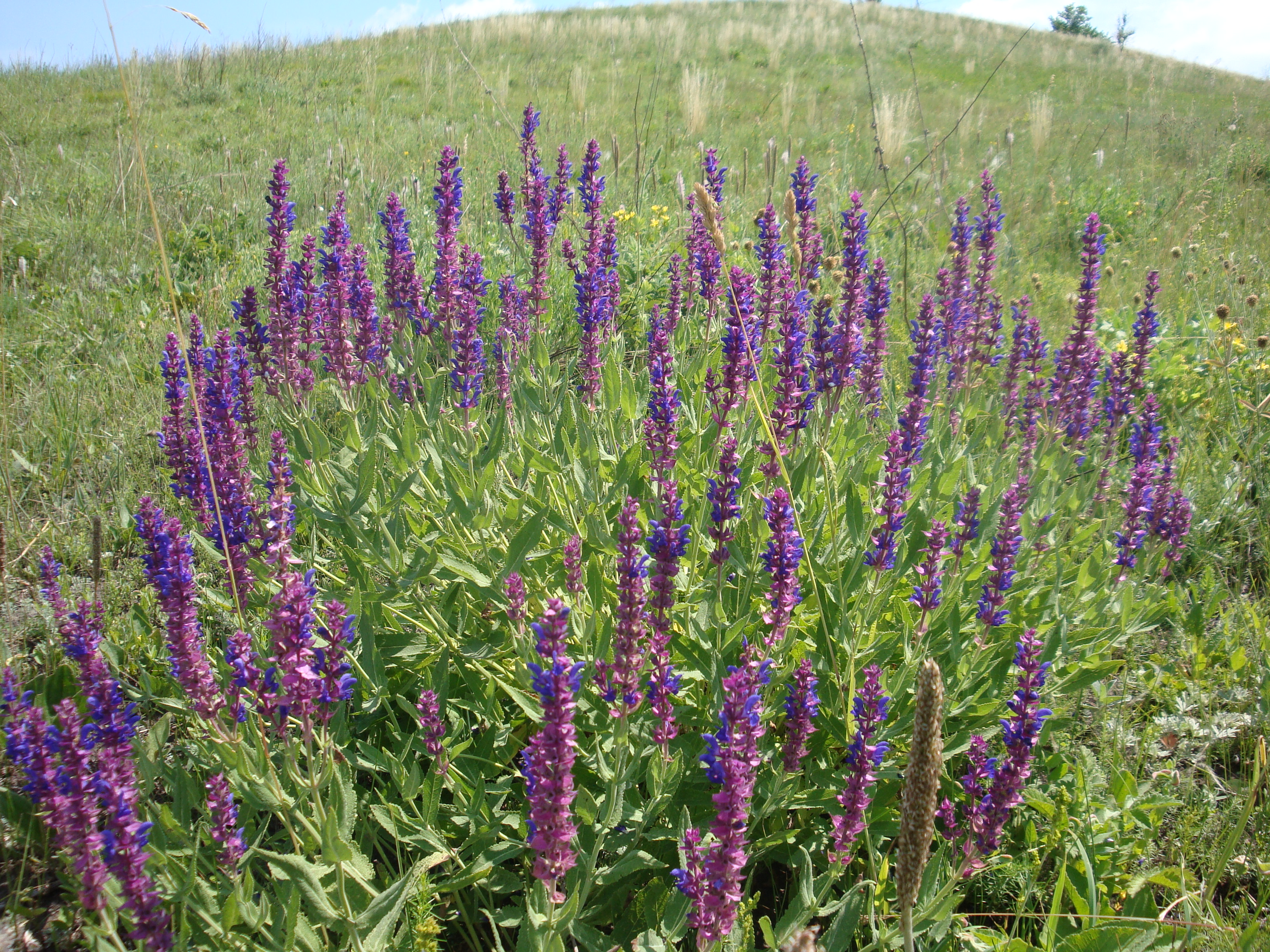 «Тулинецькі Переліски», Миронівський район, Тулинецька сільська рада